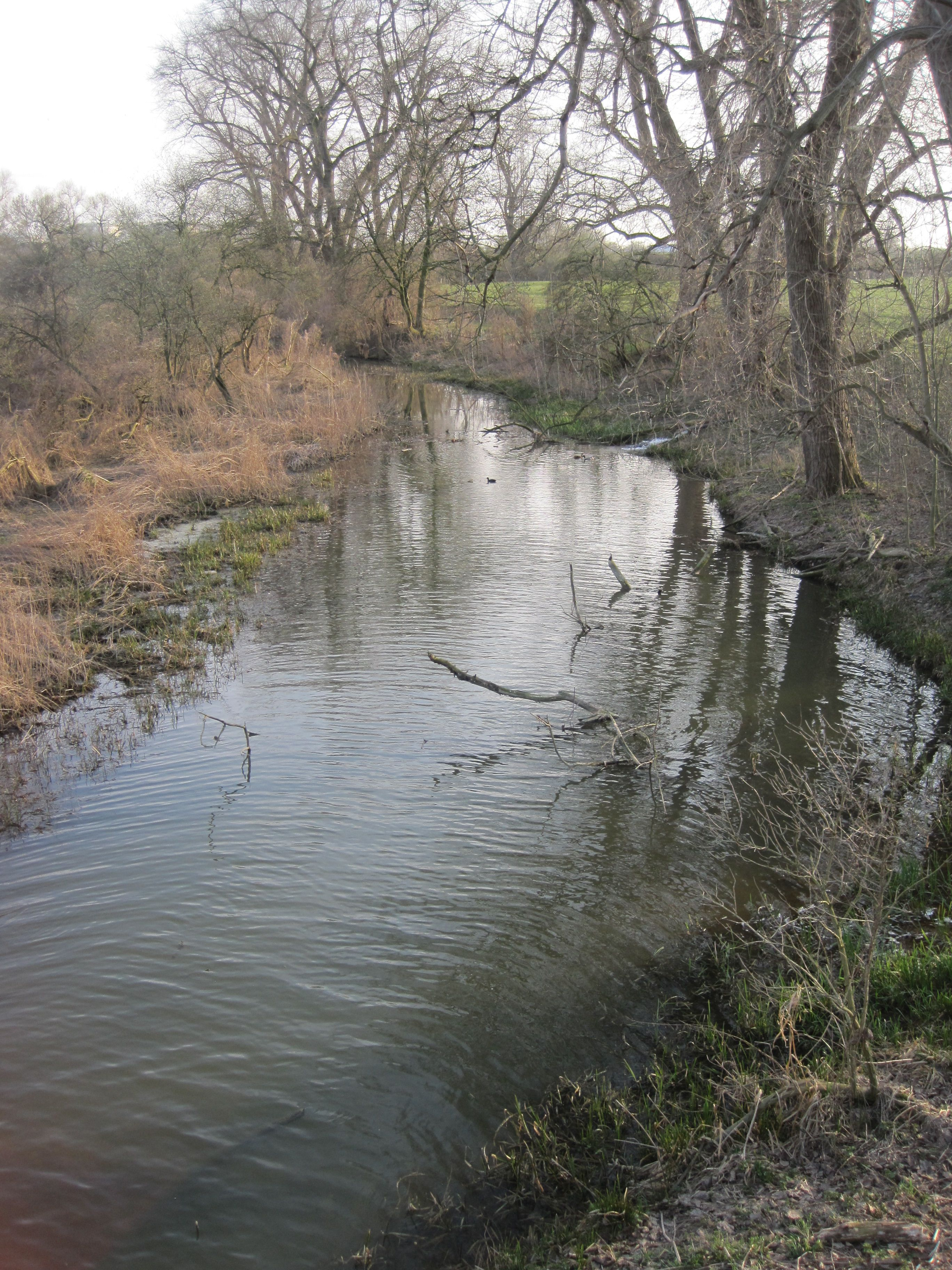 Das Foto zeigt einen Altarm der Lippe am Radbodsee in Hamm-Bockum-Hövel.